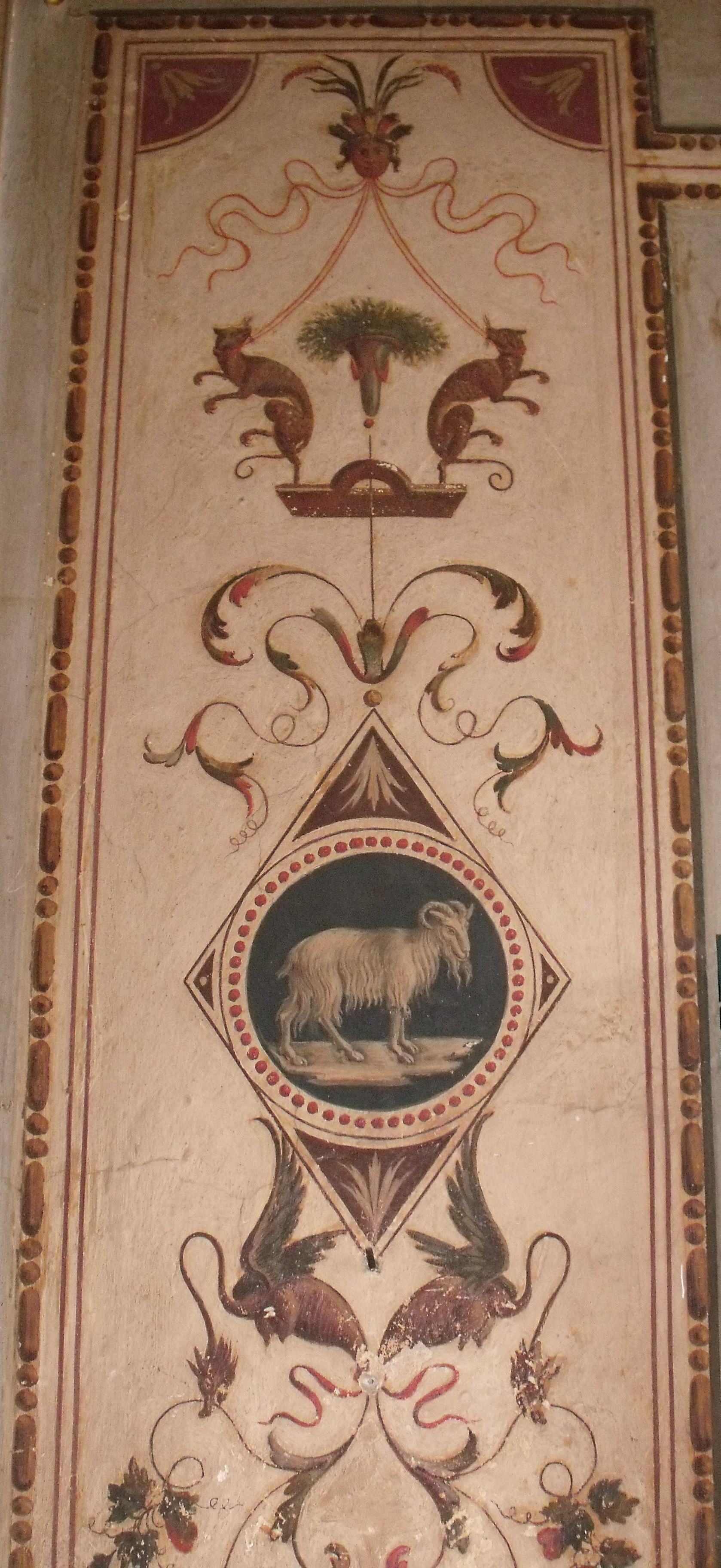 Esempio di grottesche parietali in una delle sale della Biblioteca Comunale di Anghiari.